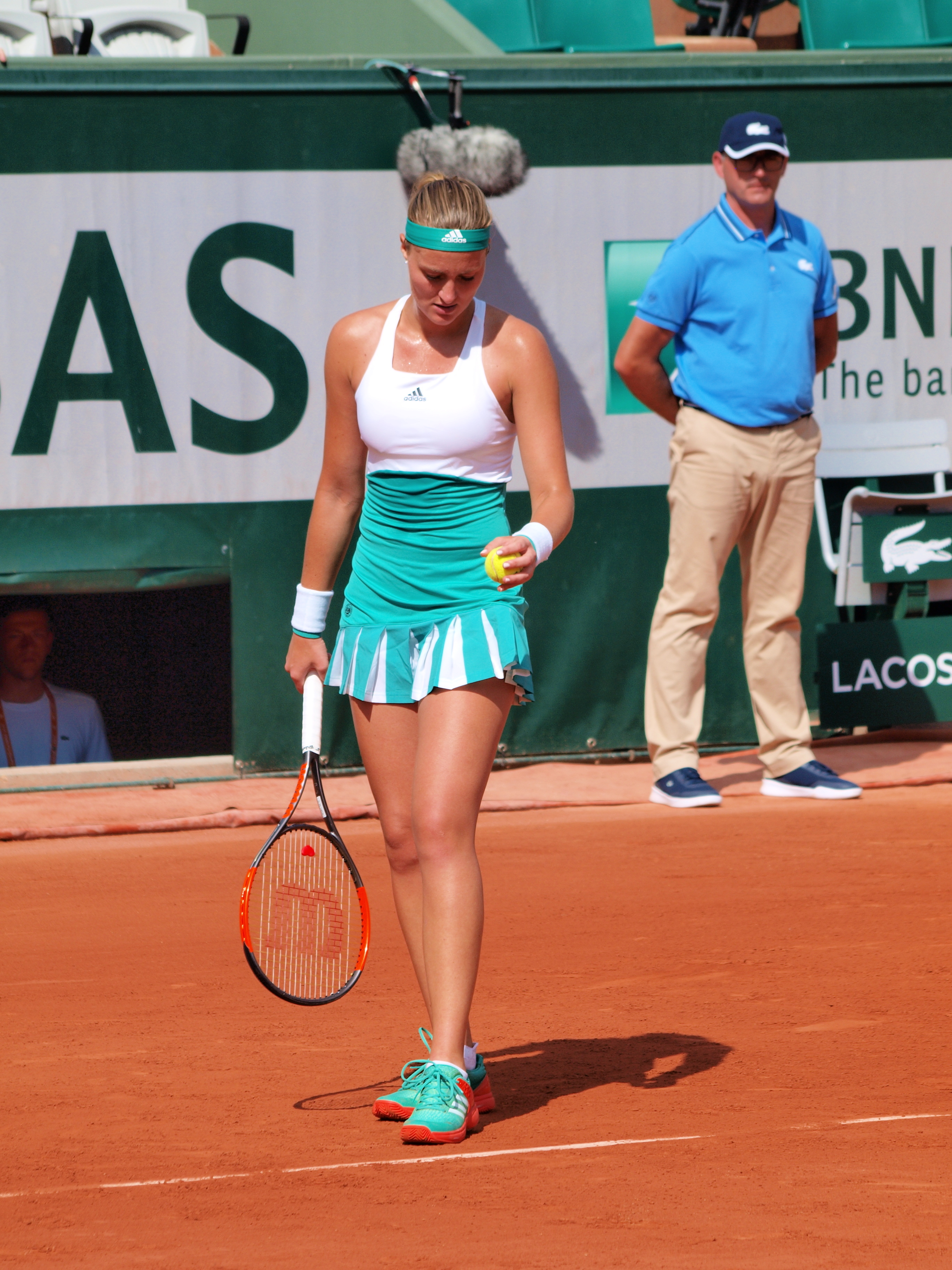 Kristina Mladenovic, aux Internationaux de France de Roland Garros (Paris), le 31 mai 2017, dans son match contre Sara Errani.